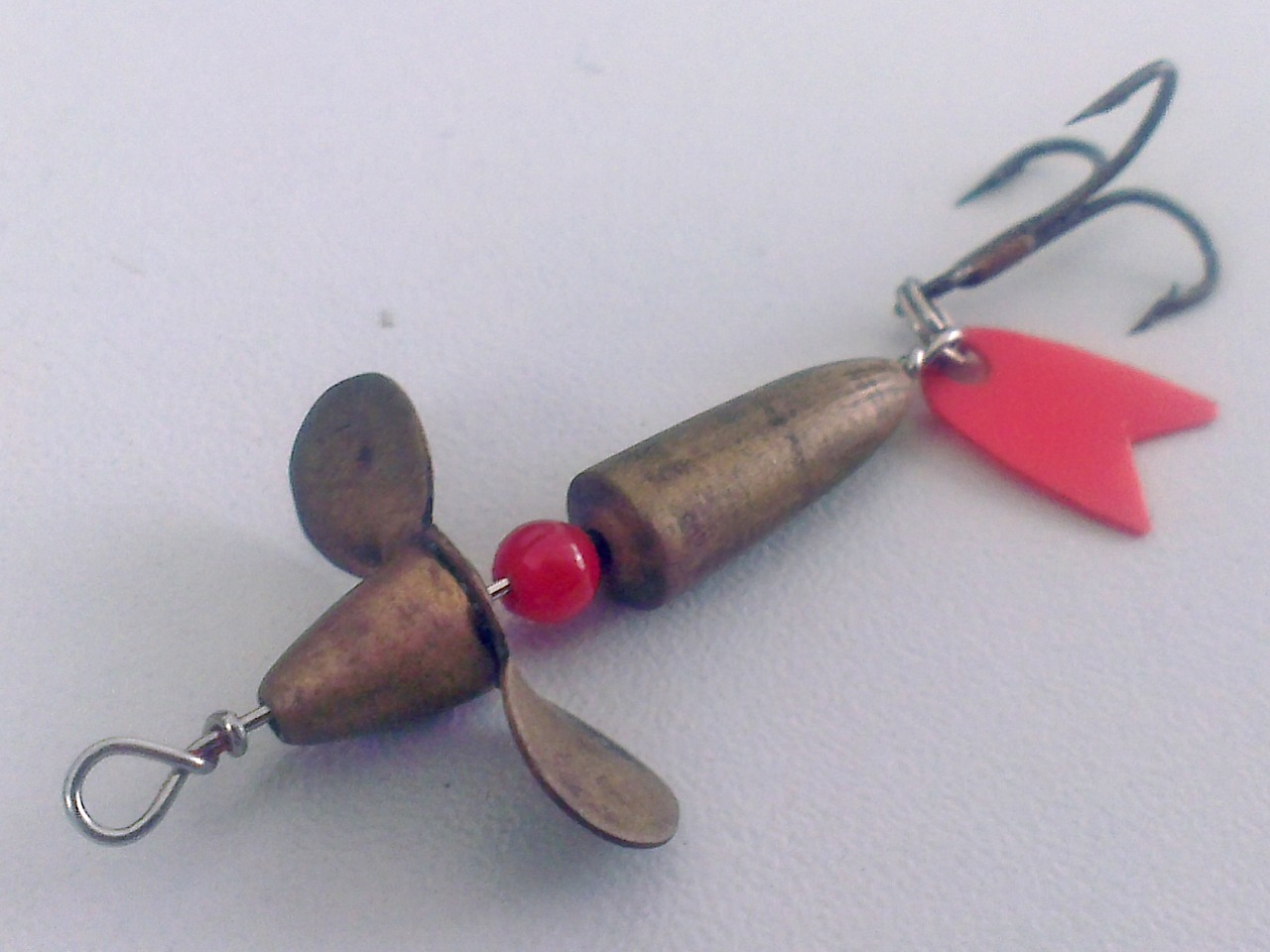 Rekunstruktion eines Devon ( Mennow ) Spinner.